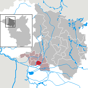 Sieversdorf-Hohenofen in Brandenburg (Country) - District Ostprignitz-Ruppin